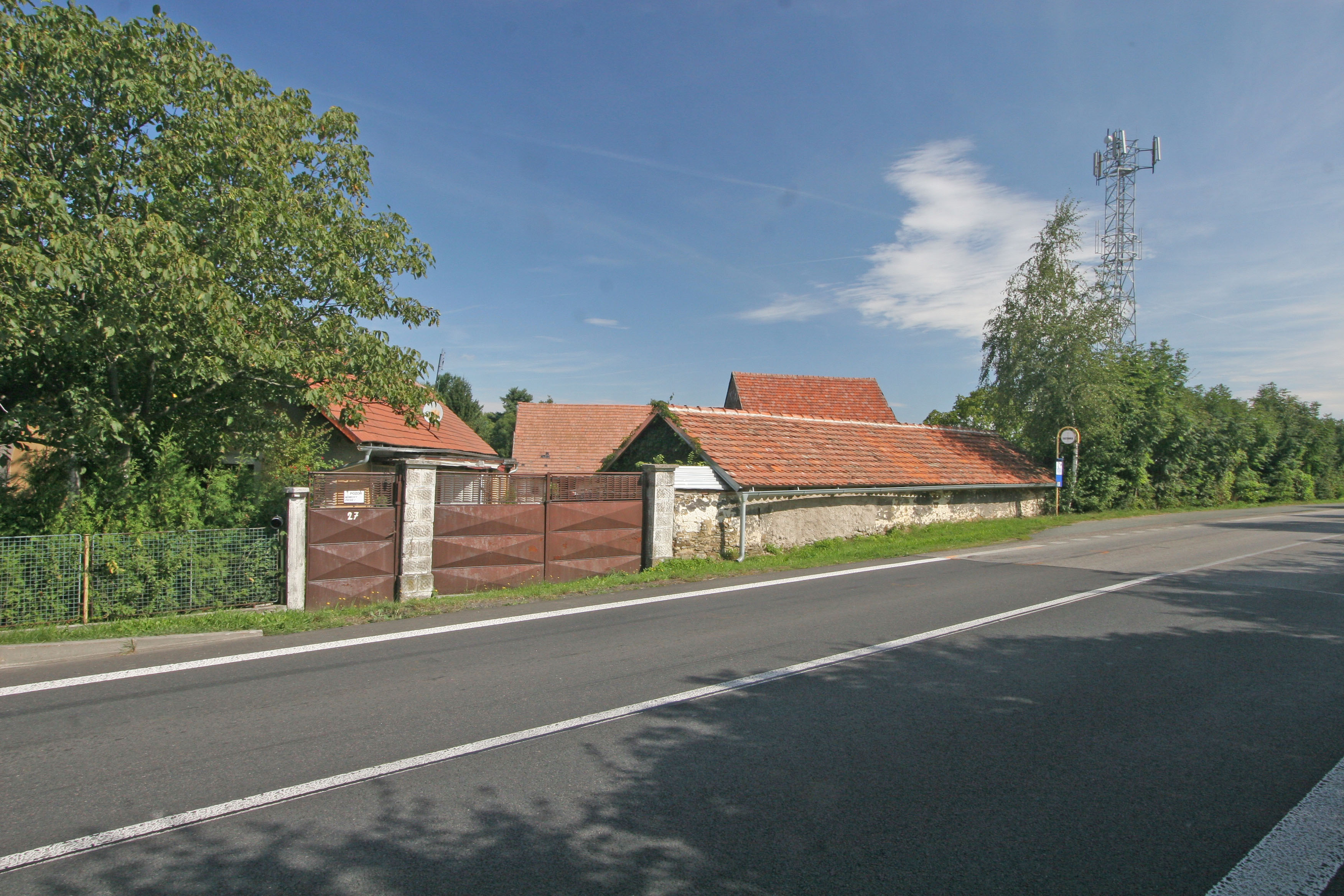 Bukovina u Přelouče čp. 27